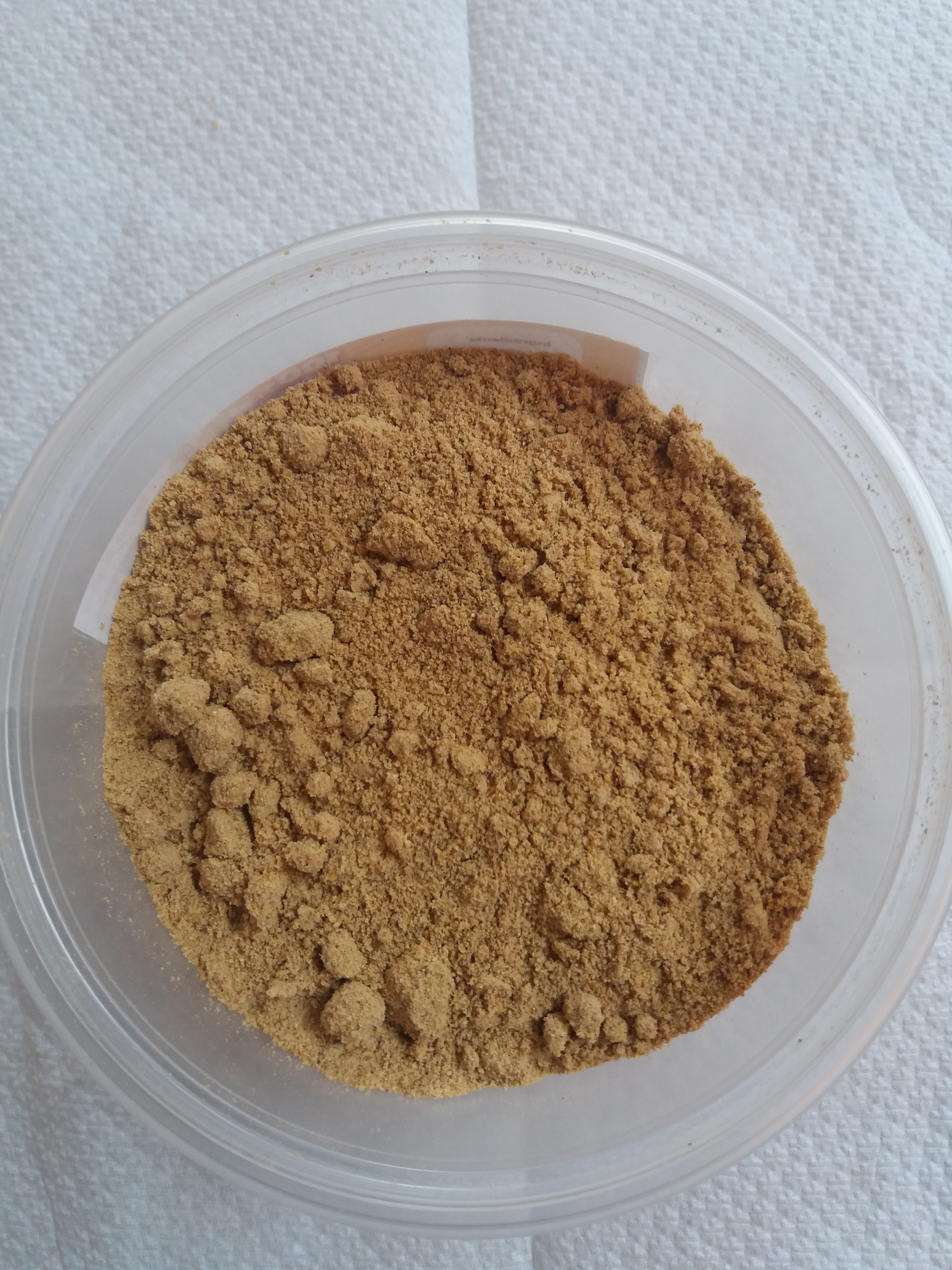 Kreyòl ayisyen : Se sa yo rele chanmchanm nan. Li se yon manje tradisyonèl peyi Ayiti. Li tankou yon poud mayi.